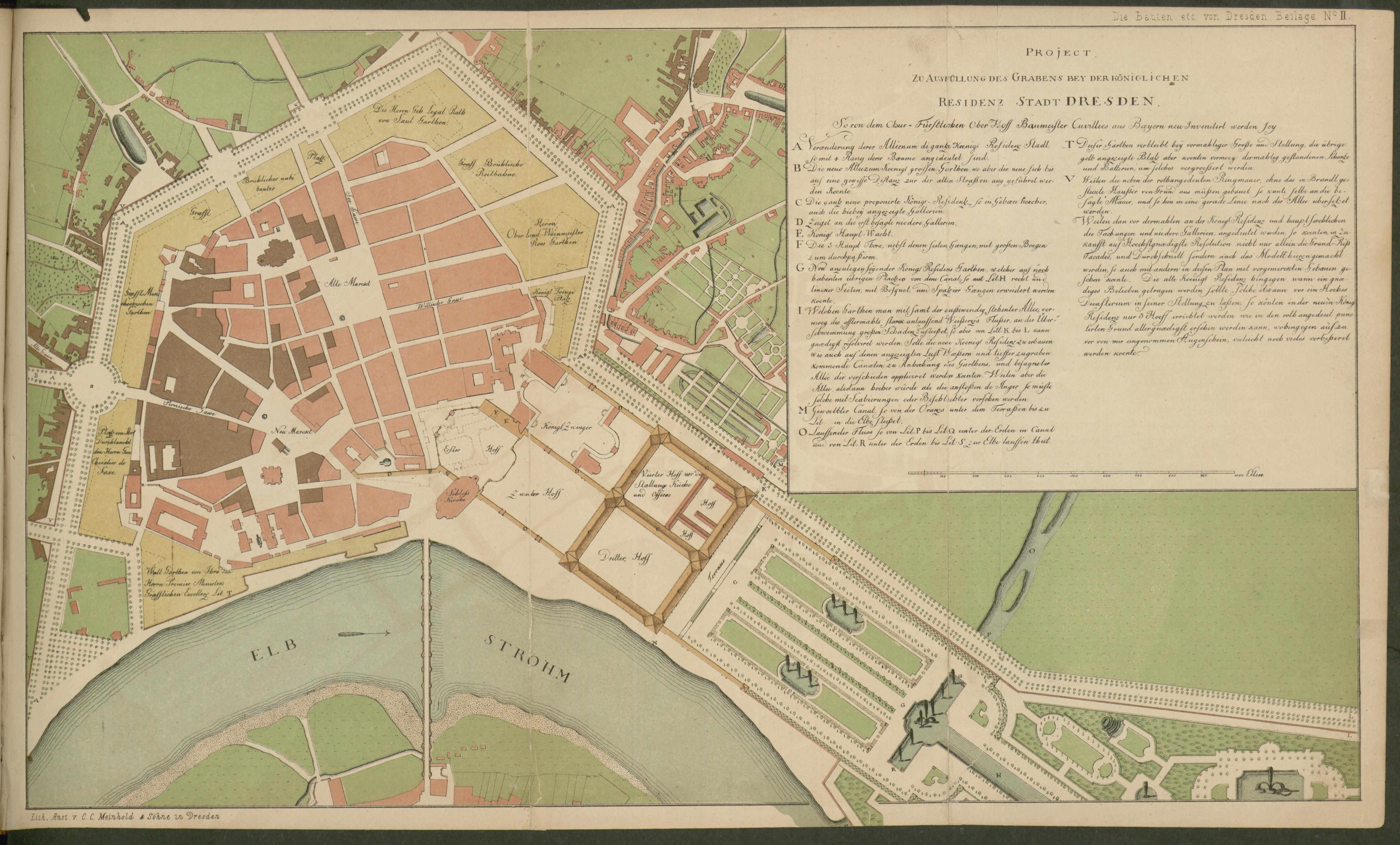 siehe Bildtext aus: Die Bauten, technischen und industriellen Anlagen von Dresden. Herausgegeben vom Sächs. Ingenieur- und Architekten-Verein und vom Dresdener Architekten-Verein. Meinhold, Dresden 1878